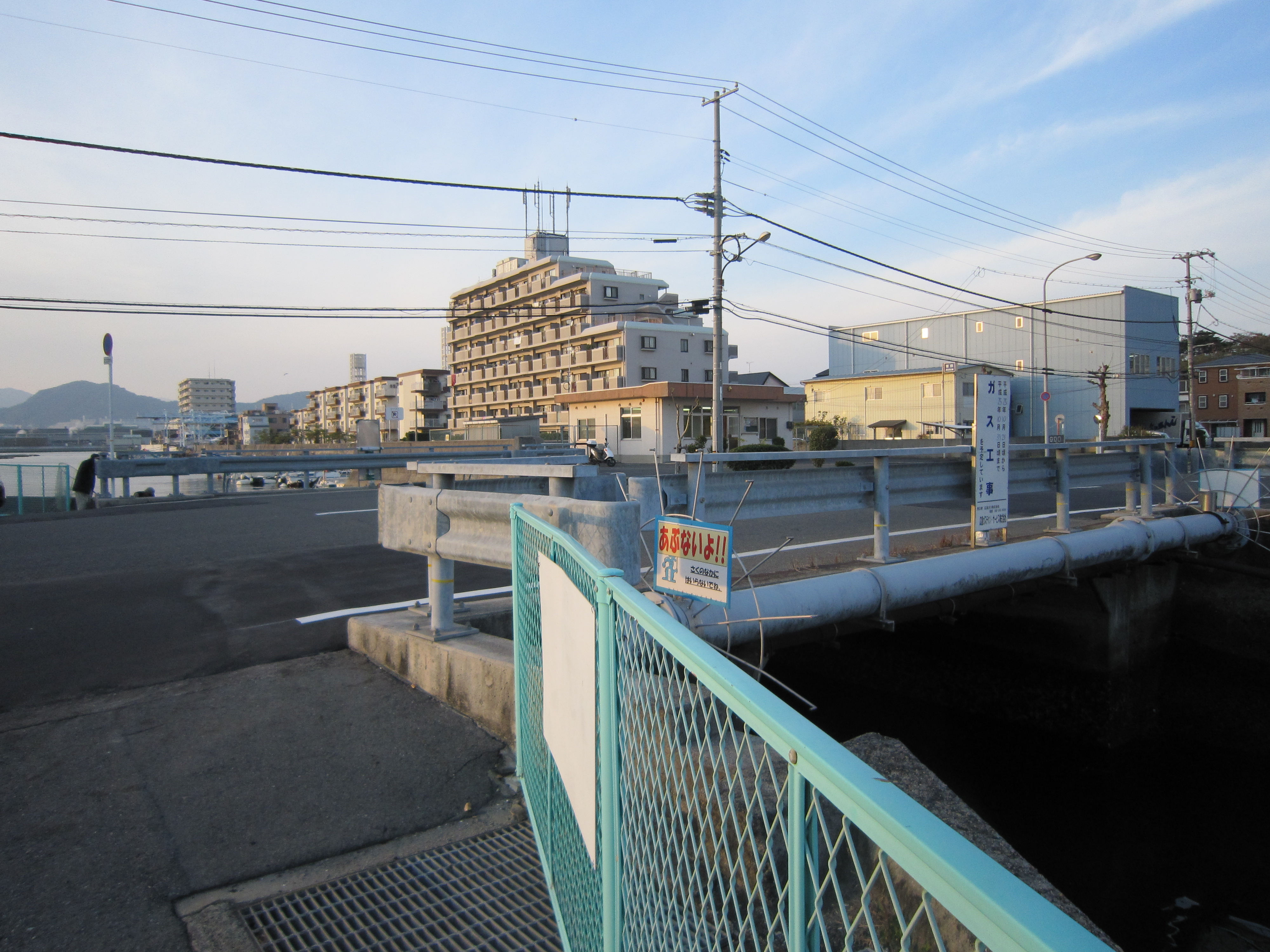 広島市中区江波南～江波沖町を結ぶ広島市道横川江波線の橋梁。